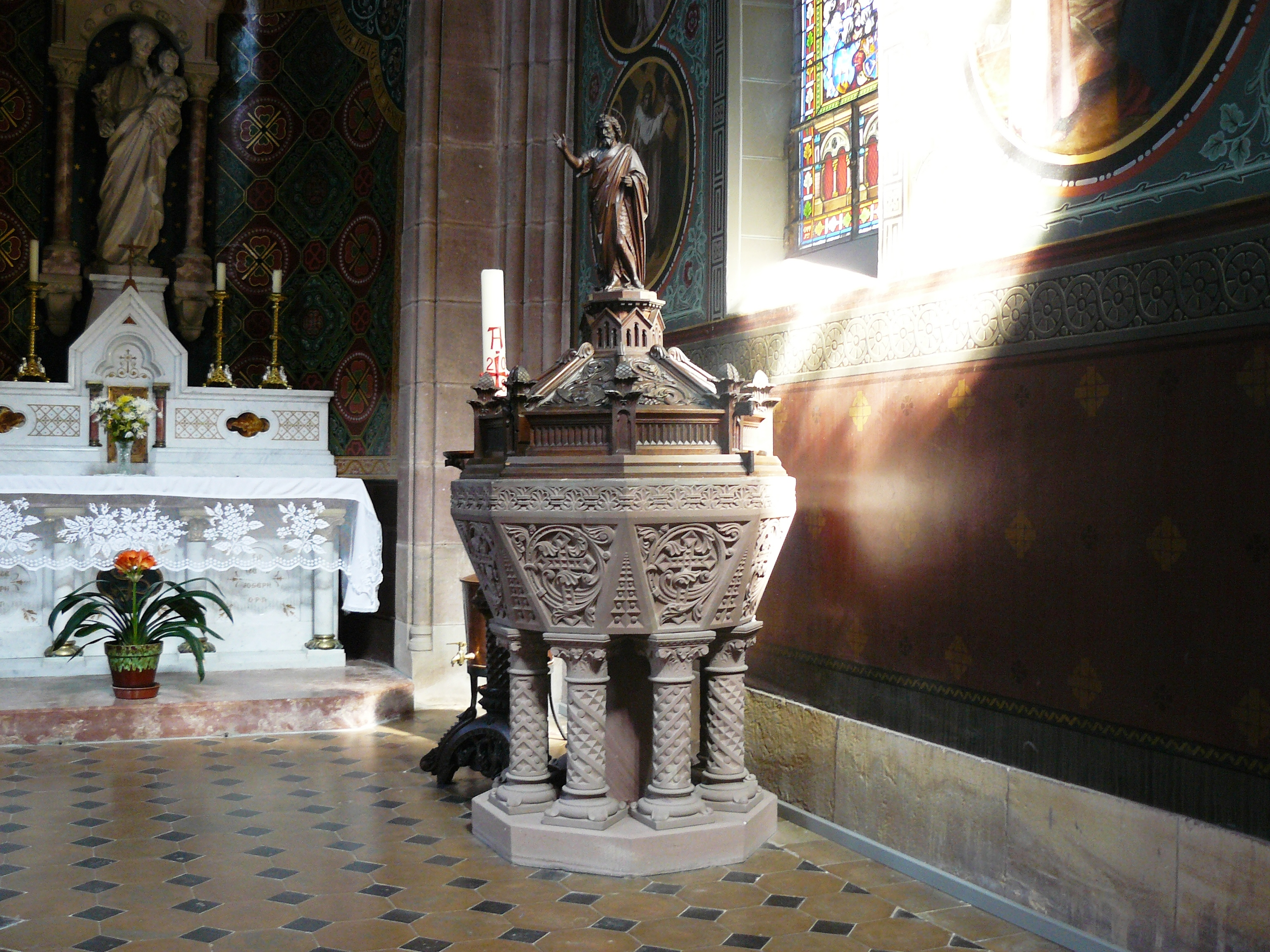 Fonts baptismaux (XVIIIe siècle) se trouvant dans l'église